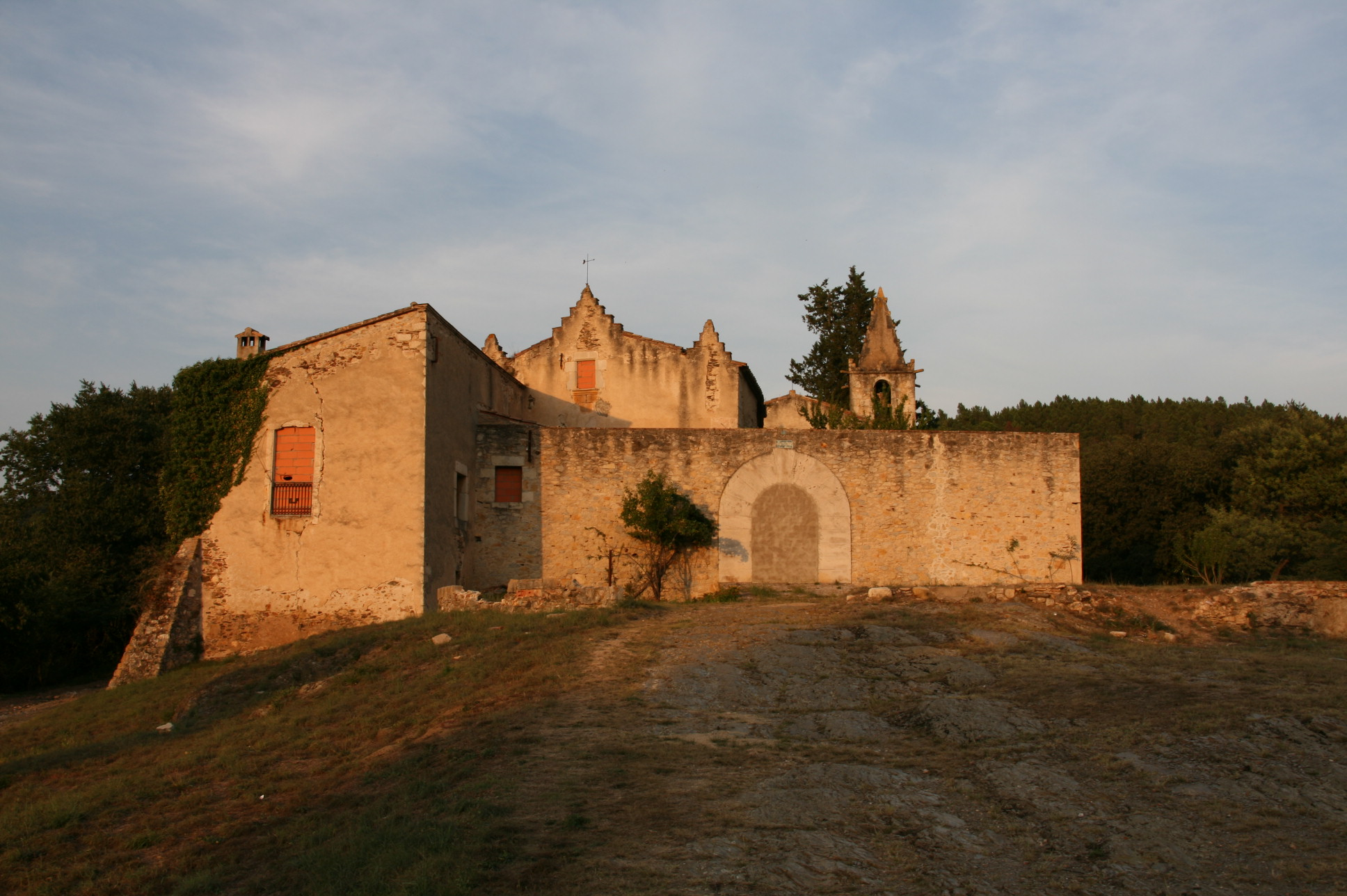 Vista general del Castell de Palol